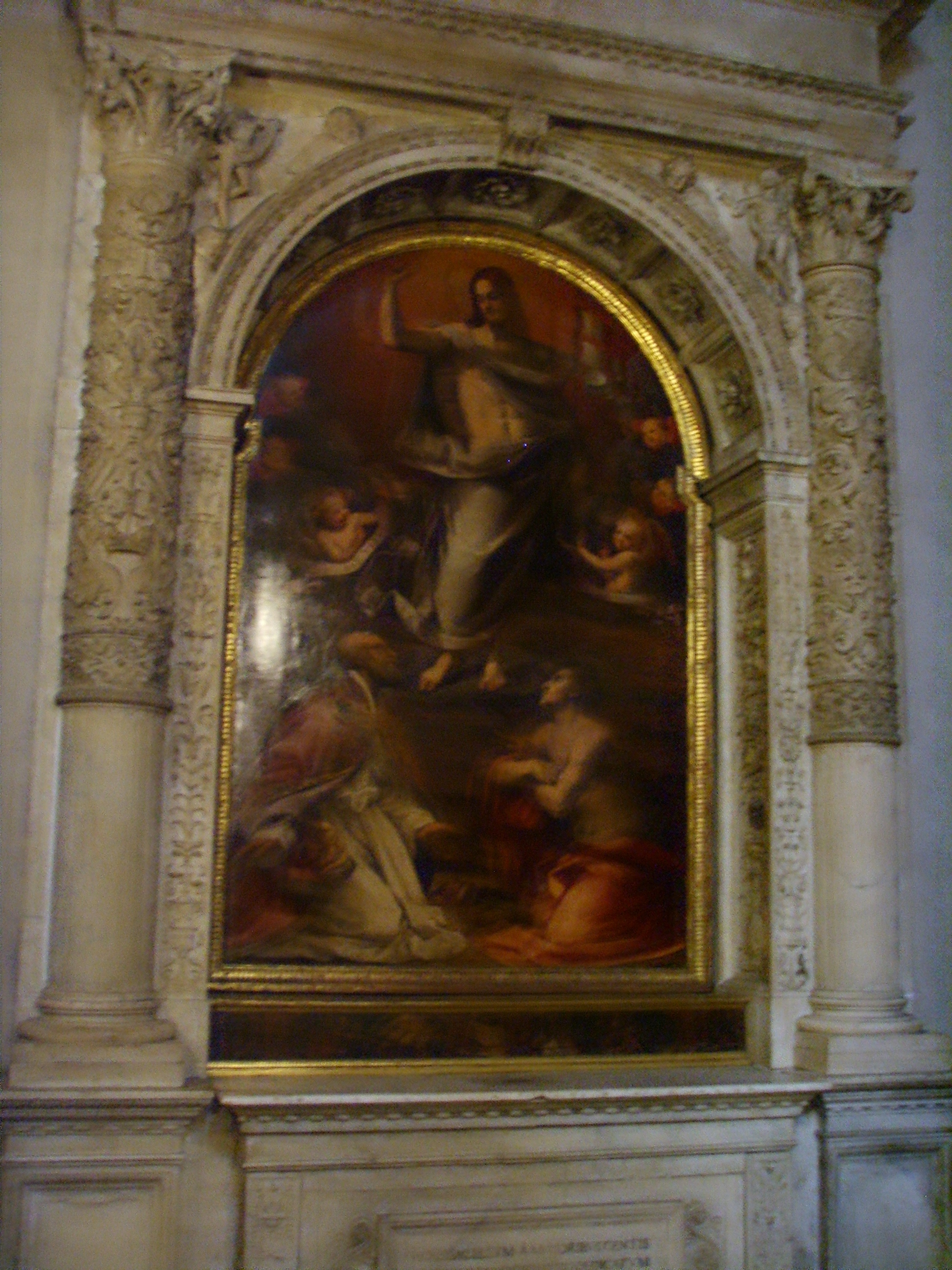 Santa Trinita, ,_Maso_da_San_Friano, Cristo_risorto_(1582), inside, Florence, Italy